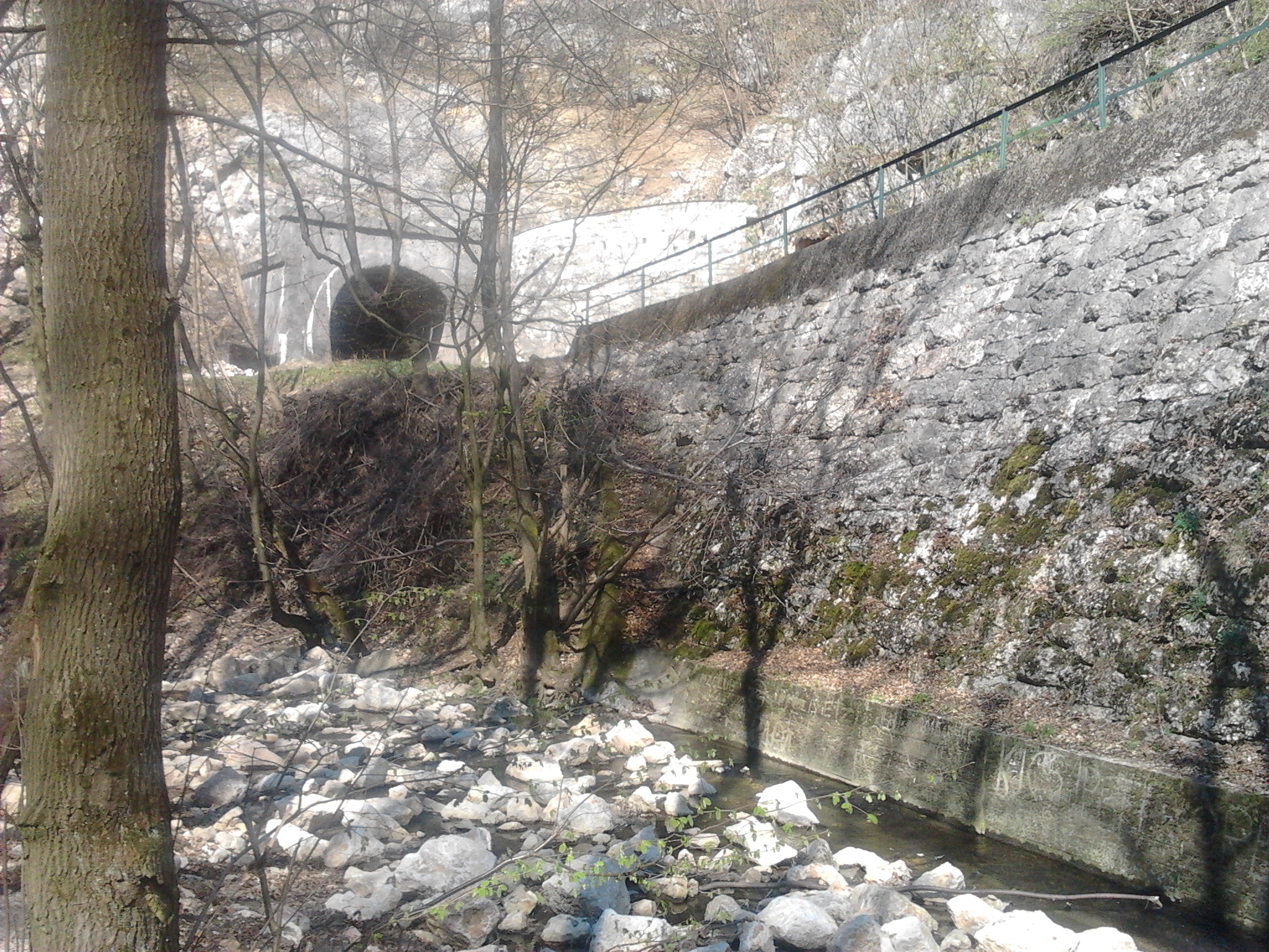 Vasúti alagút a Cuha-patak mellett a piros turistaút mentén.